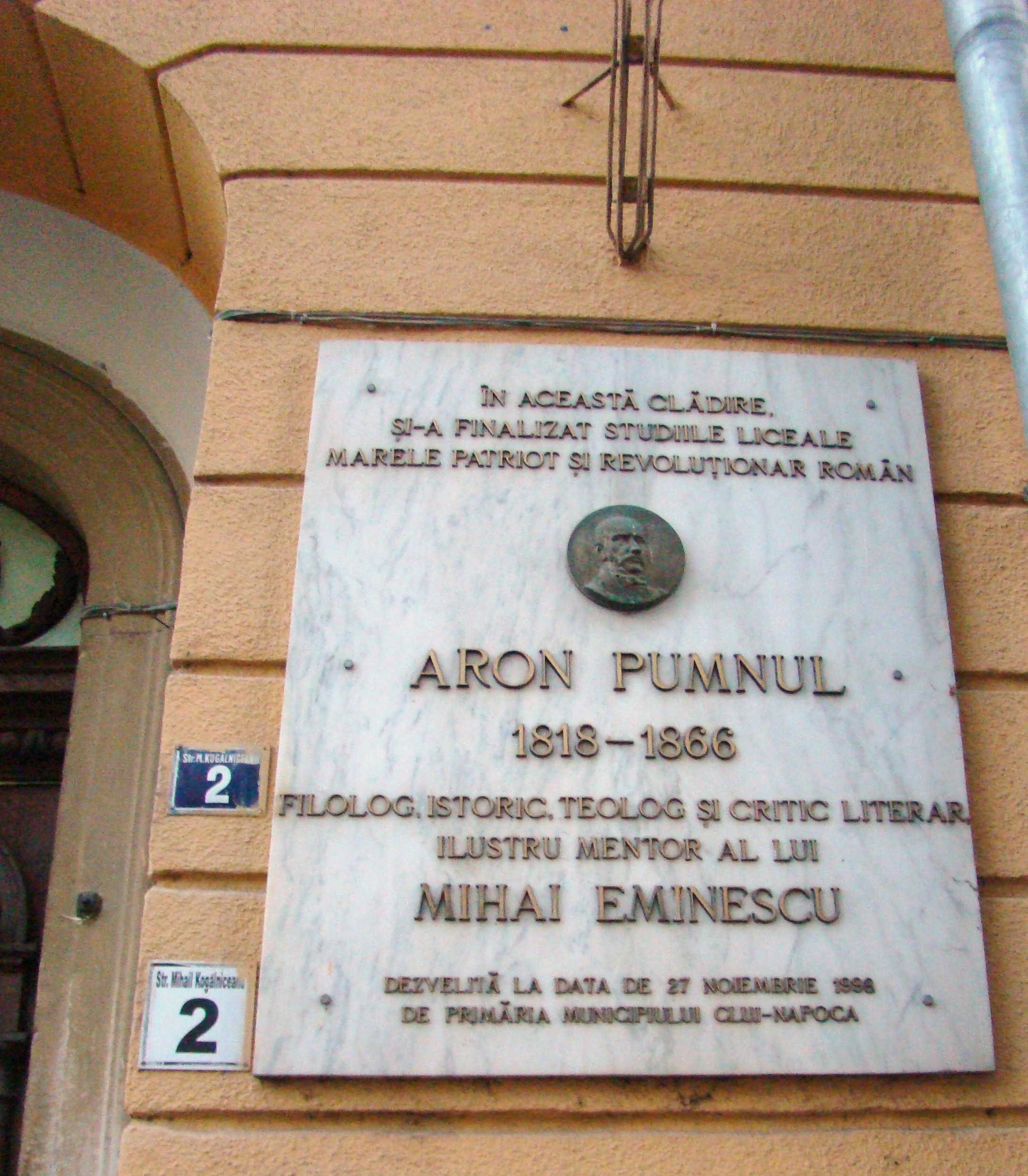 Școala din Cluj în care și-a definitivat studiile liceale Aron Pumnul